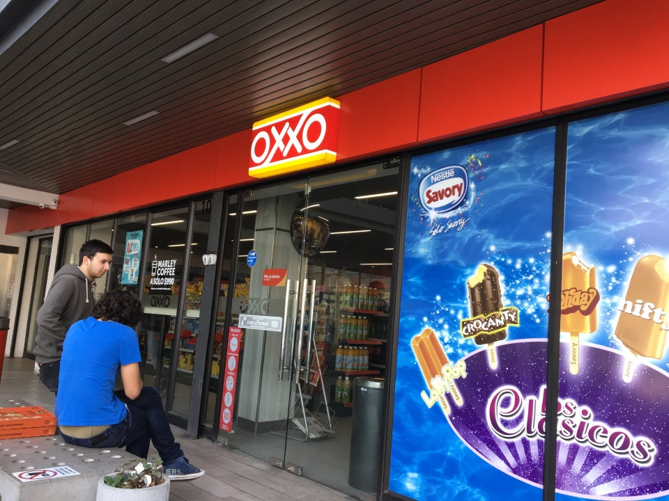 OXXO Chile